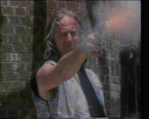 נתן זהבי ב"מוות בטוח" מתוך "סיפורים לשעת לילה מאוחרת